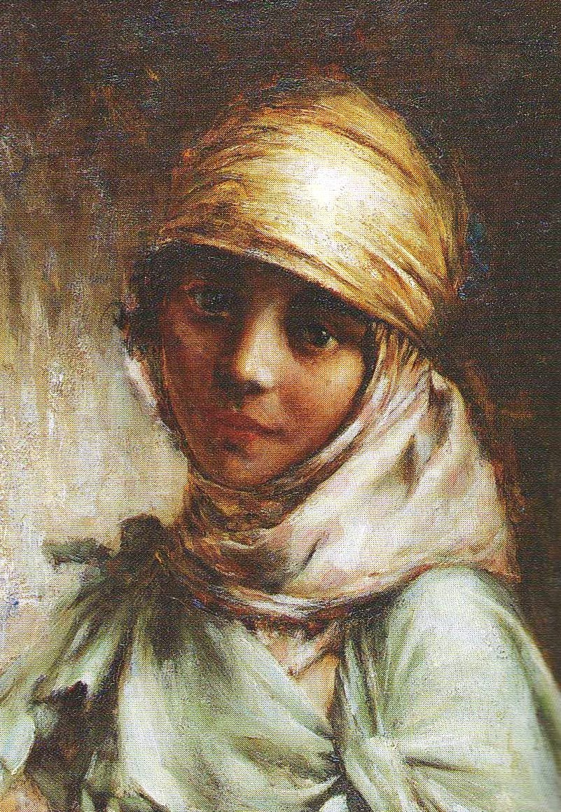 Aïcha (Algérie). Huile sur panneau